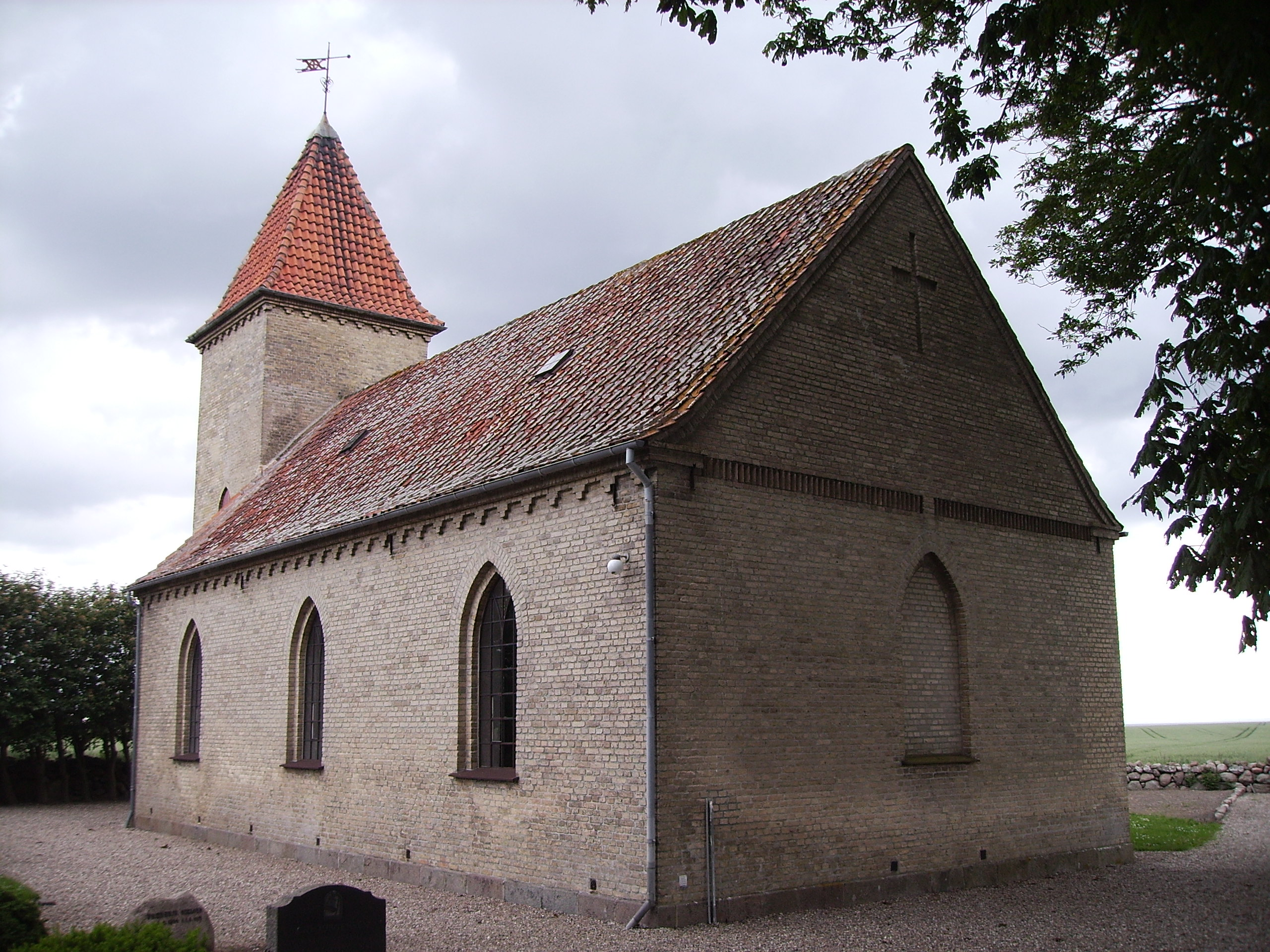 Bågø Kirke, Bågø Sogn, Båg Herred, Odense Amt, Denmark (Danish Church) - Bågø Kirke fra sydøst